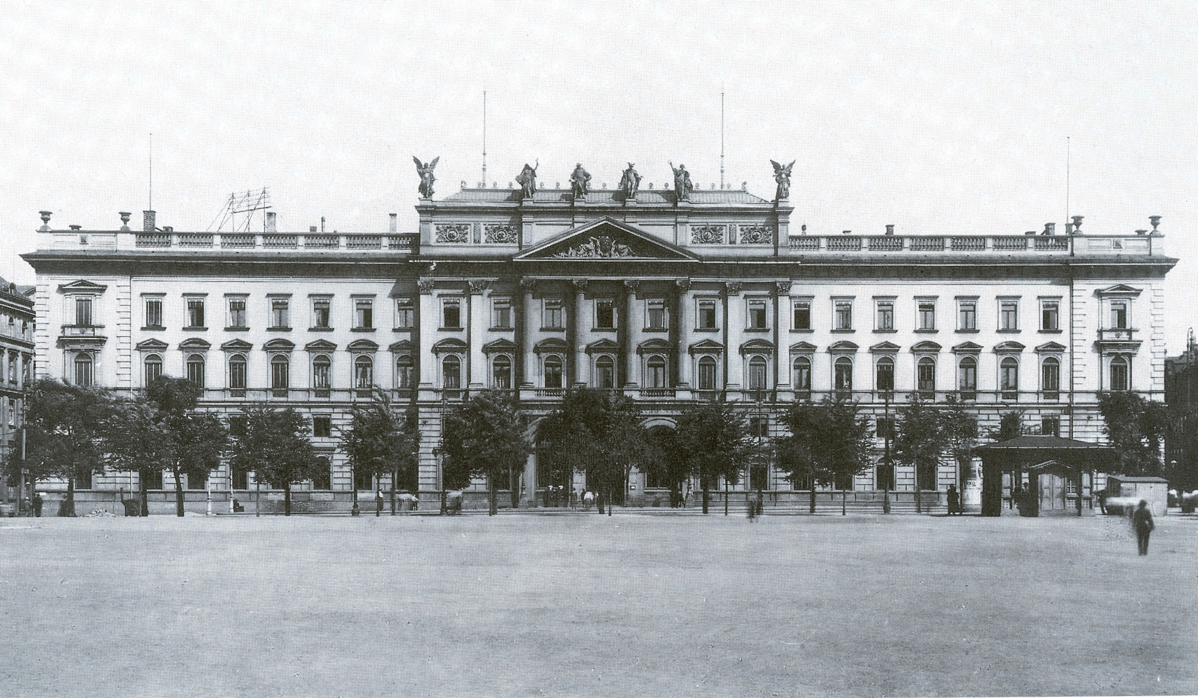 Leipzig, Hauptpostamt am Augustusplatz